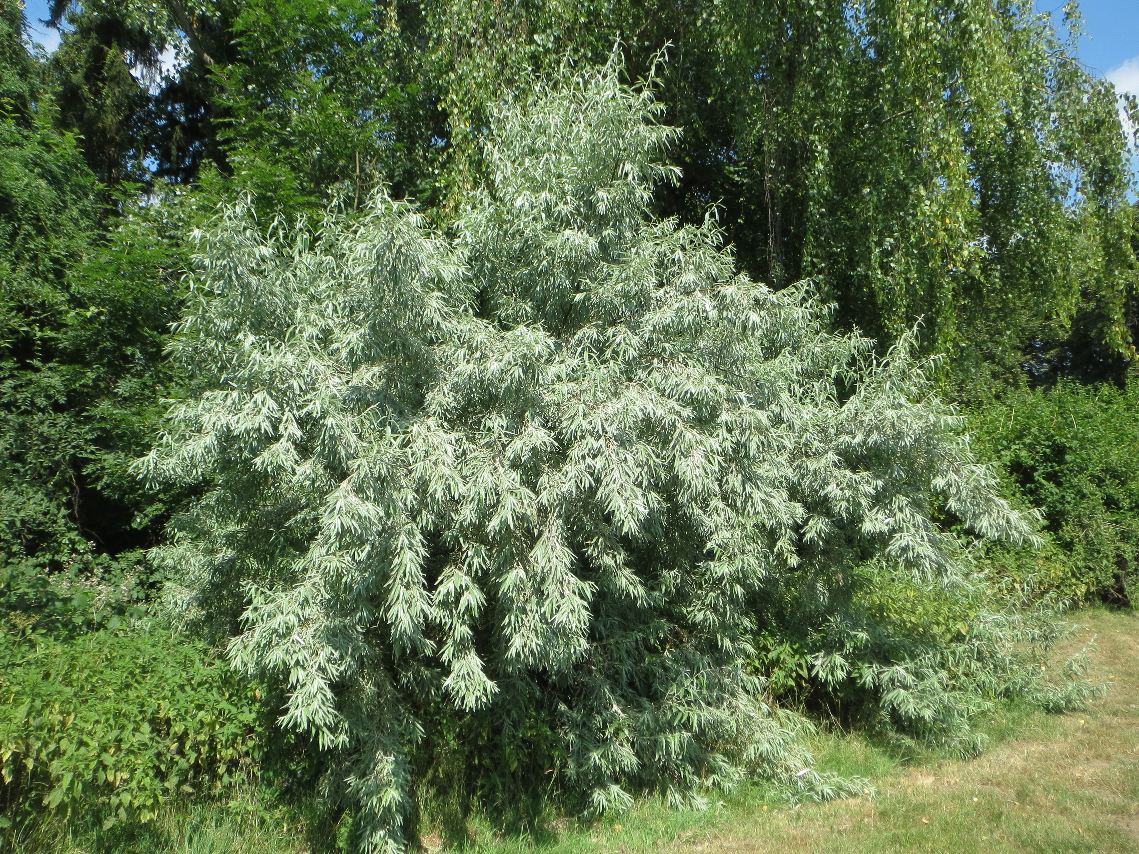 Schmalblättrige Ölweide (Elaeagnus angustifolia) am Hauptfriedhof Saarbrücken